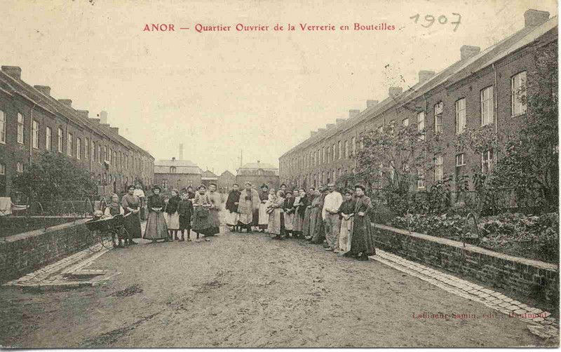 Anor - quartier ouvrier de la verrerie en bouteilles